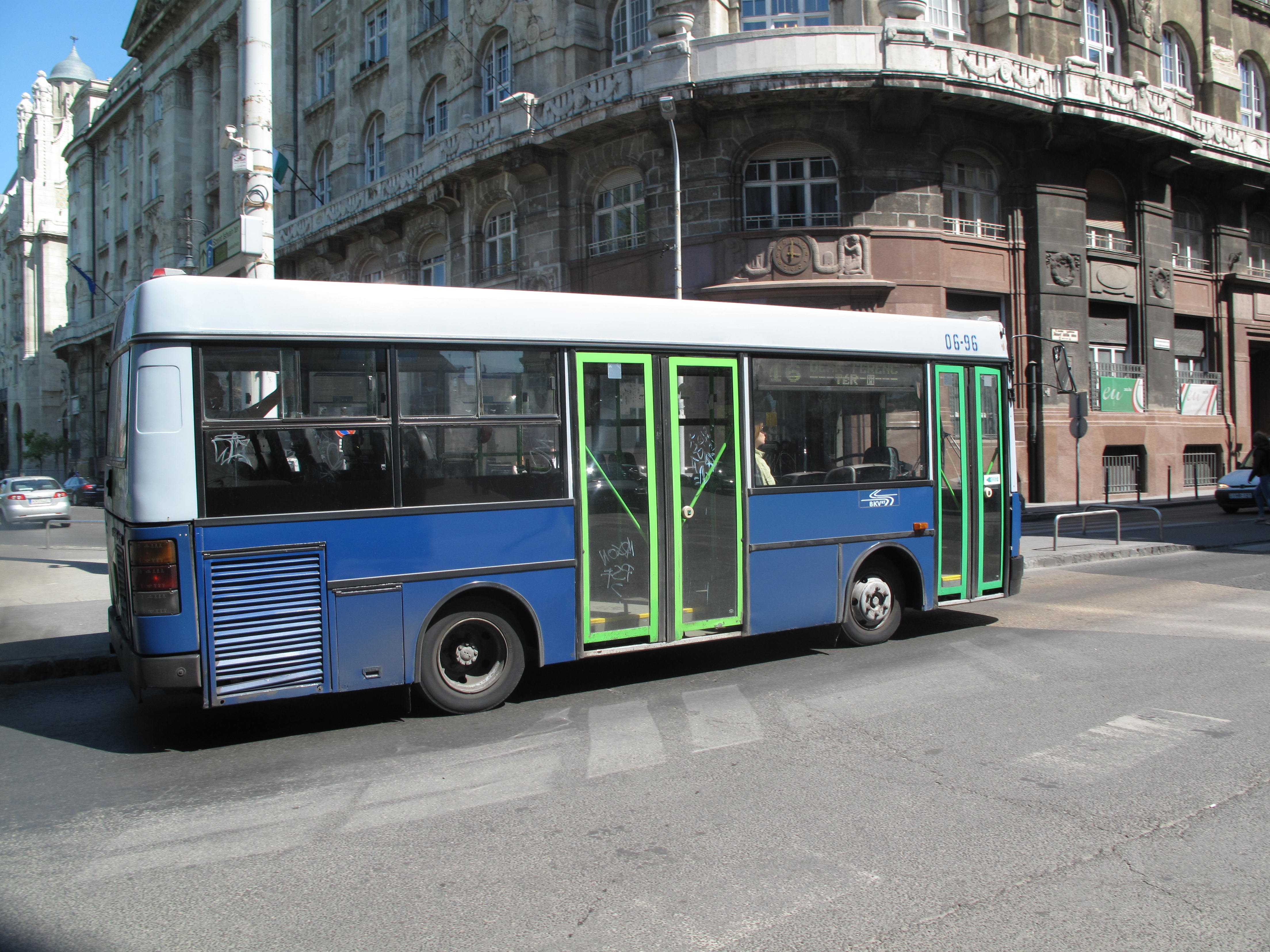 Budapešť